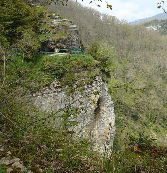 Вход в Ахштырскую пещеру